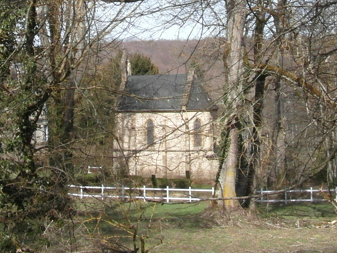 Château d'Arzay (chapelle) en mars 2019